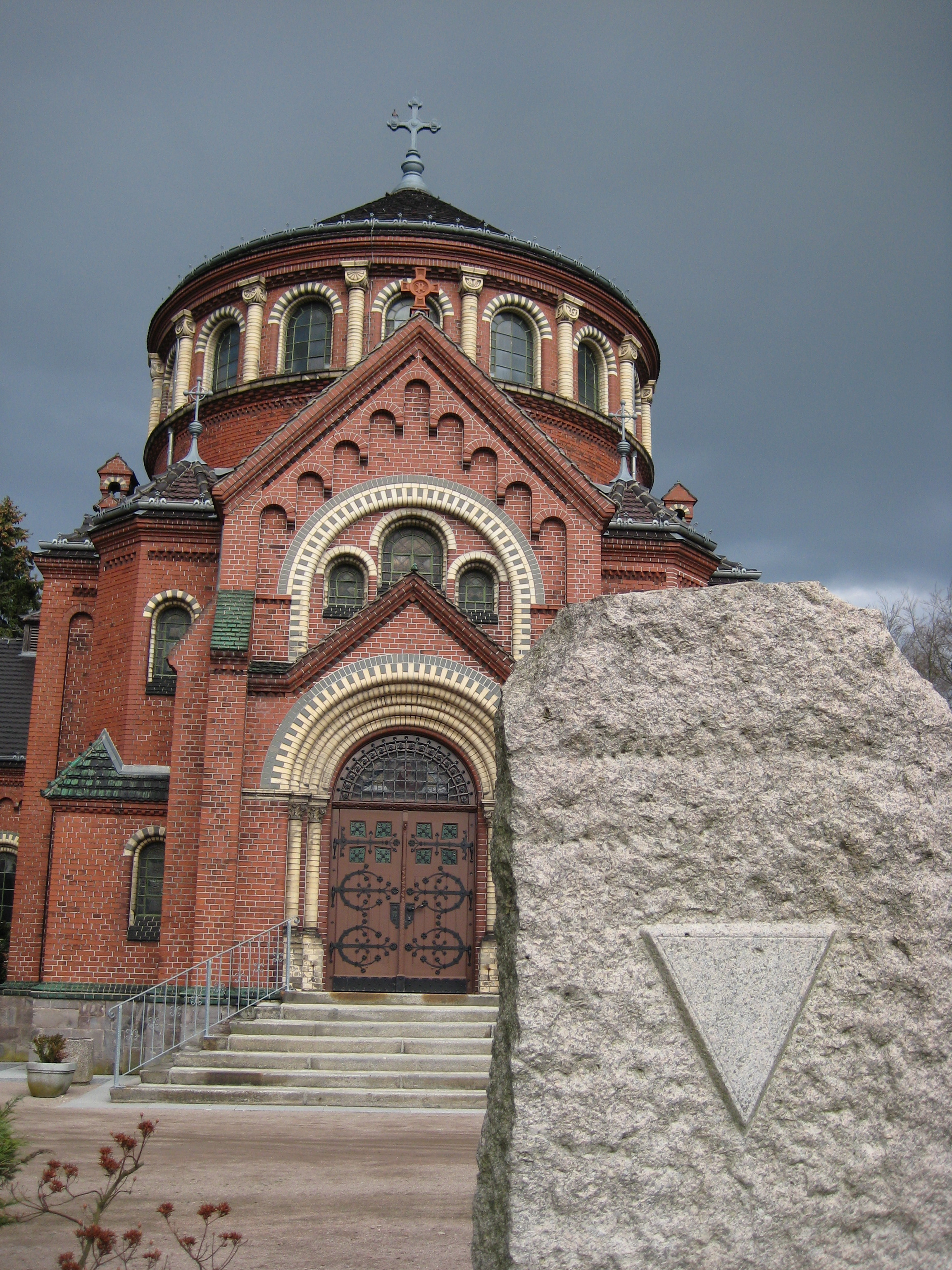 Mahnmal für die Opfer des Faschismus/Nationalsozialismus in Deutschland mit dem "Dreieck" als Symbol für die KZ-Häftlinge.